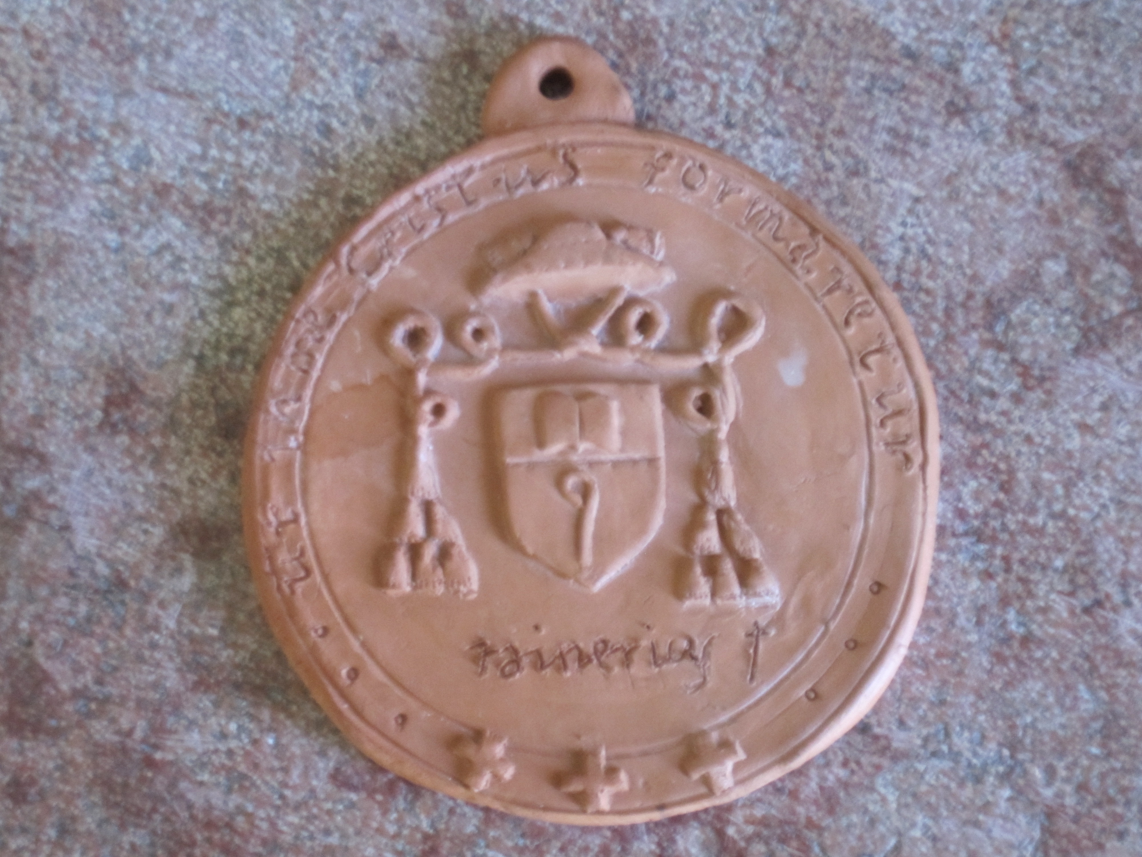 Sigillo rappresentante lo stemma araldico di Raniero da Ponza. Disegno di Mario Moiraghi.